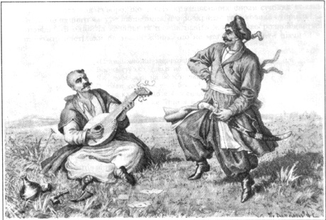 Here is an illustration from Riegelmann's "Chronicle of Little Russia" published in 1785-1786 Ілюстрація з книги Олександра Івановича Рігельмана "Літописне повіствування про Малу Росію" 1785-1786